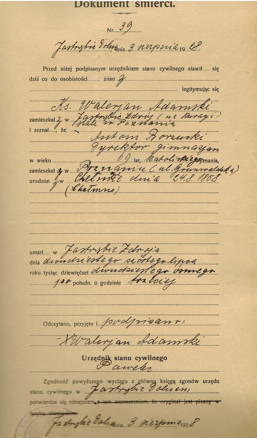 z zespołu Sąd Grodzki w Poznaniu